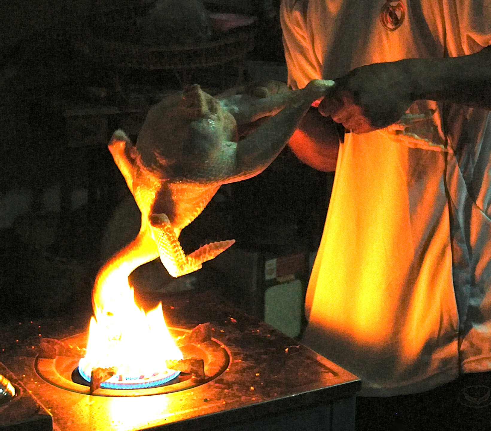 Abflammen eines geschlachteten und gerupften Huhns, um es von etwaigen restlichen Federn sowie von kleinen Härchen und Stoppeln zu befreien (hier über der Flamme eines Gaskochherds).